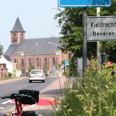 Propra foto, farita dum ekskurso, sabate la 28-an de majo 2005.